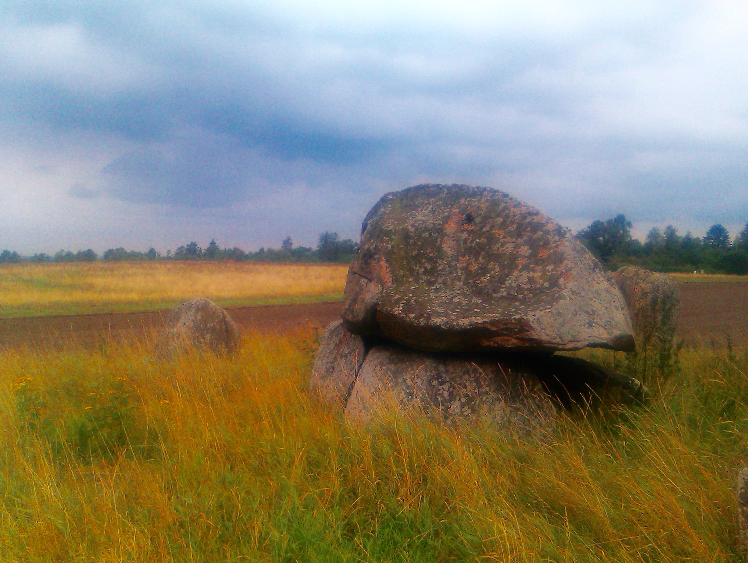 Dyssen ved Orebjerglund